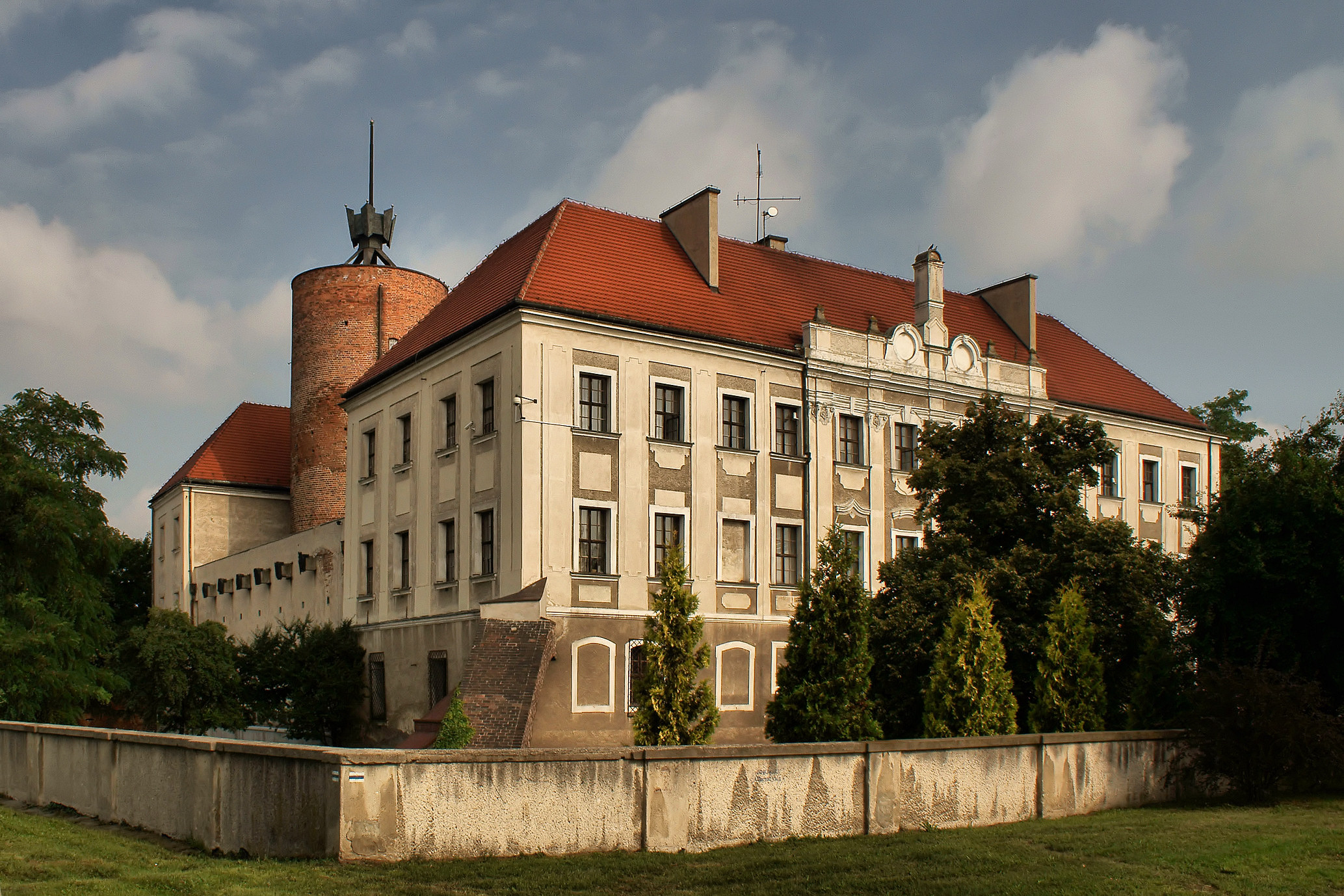 Głogów, ul. Brama Brzostowska 1 - zamek książęcy, XIII, XX